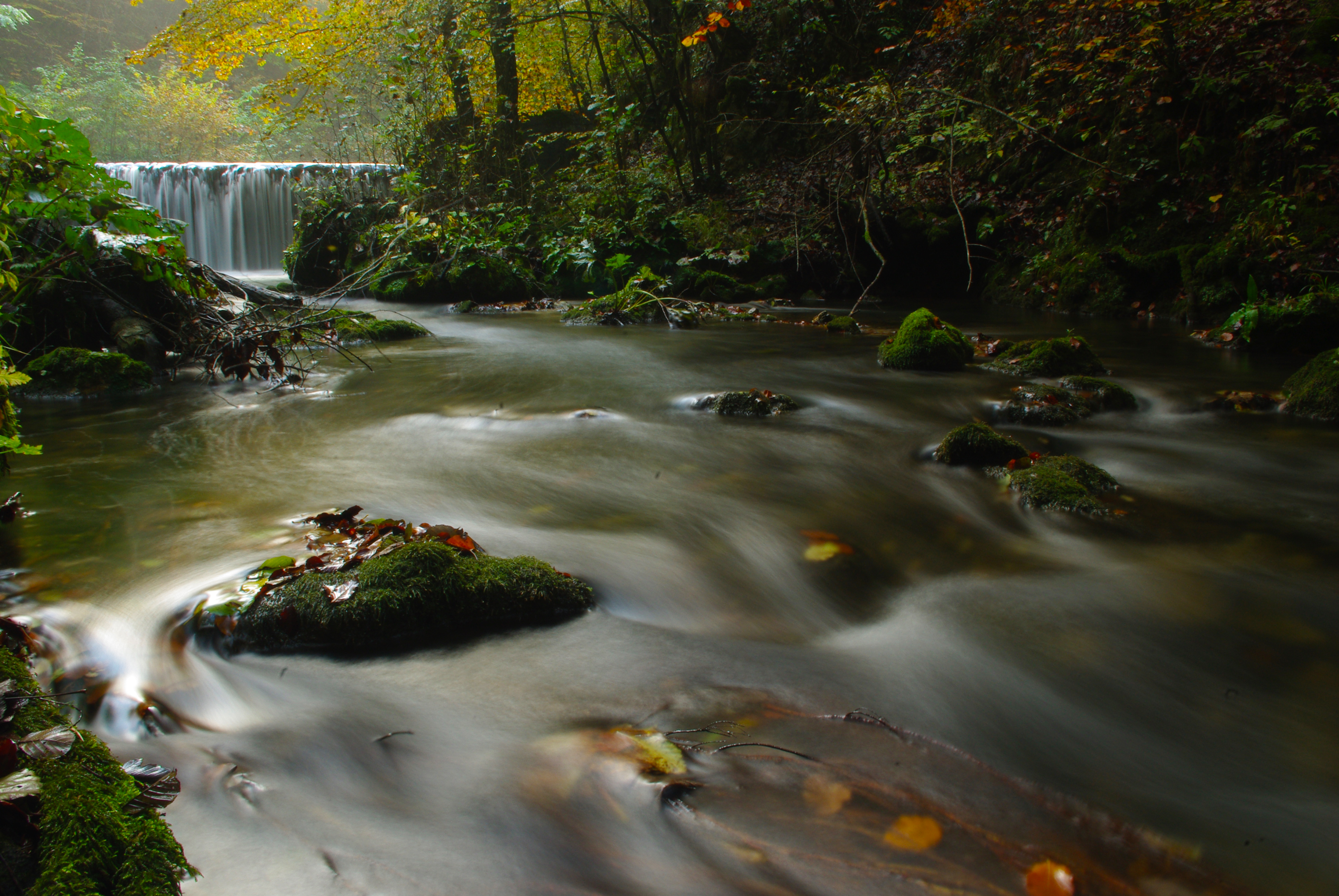 Jedna od najljepših potočnih dolina je dolina Slapnica. Potok je dobio svoje ime po brojnim slapištima i kaskadama niz koje se voda spušta uskom i duboko usječenom dolinom dužine 10 km.